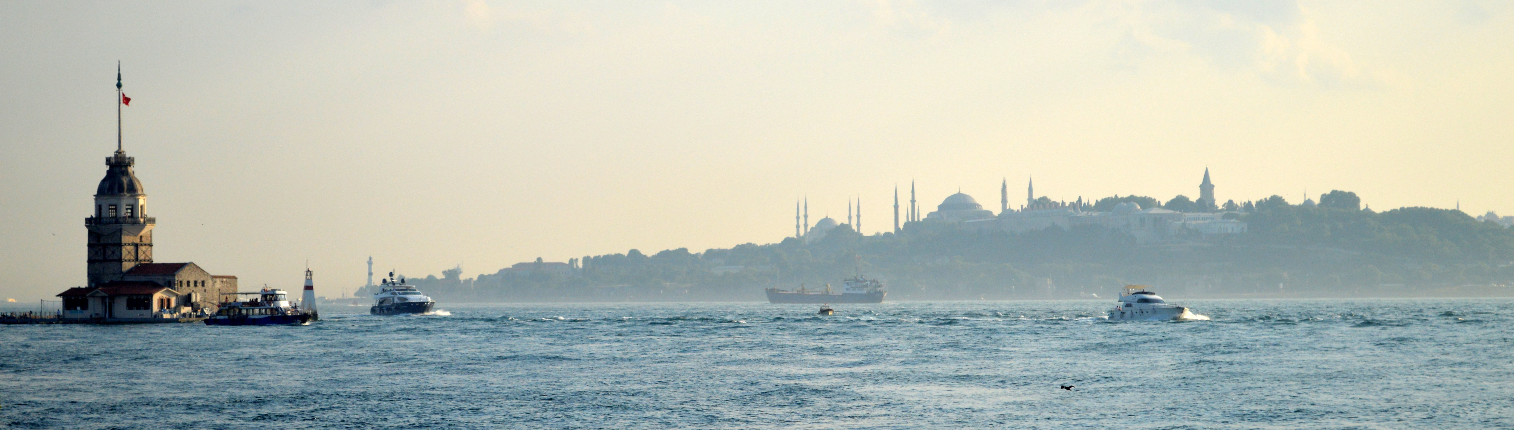 Kız kulesi ve boğaziçi